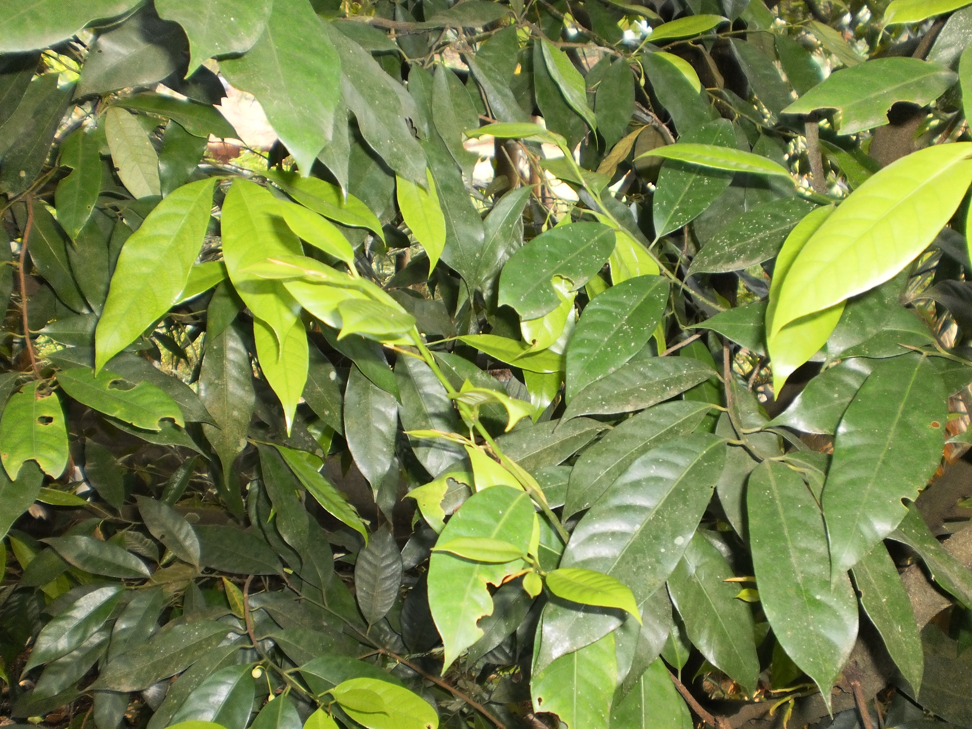 ജാതിമരത്തിന്റെ ഇലകൾ